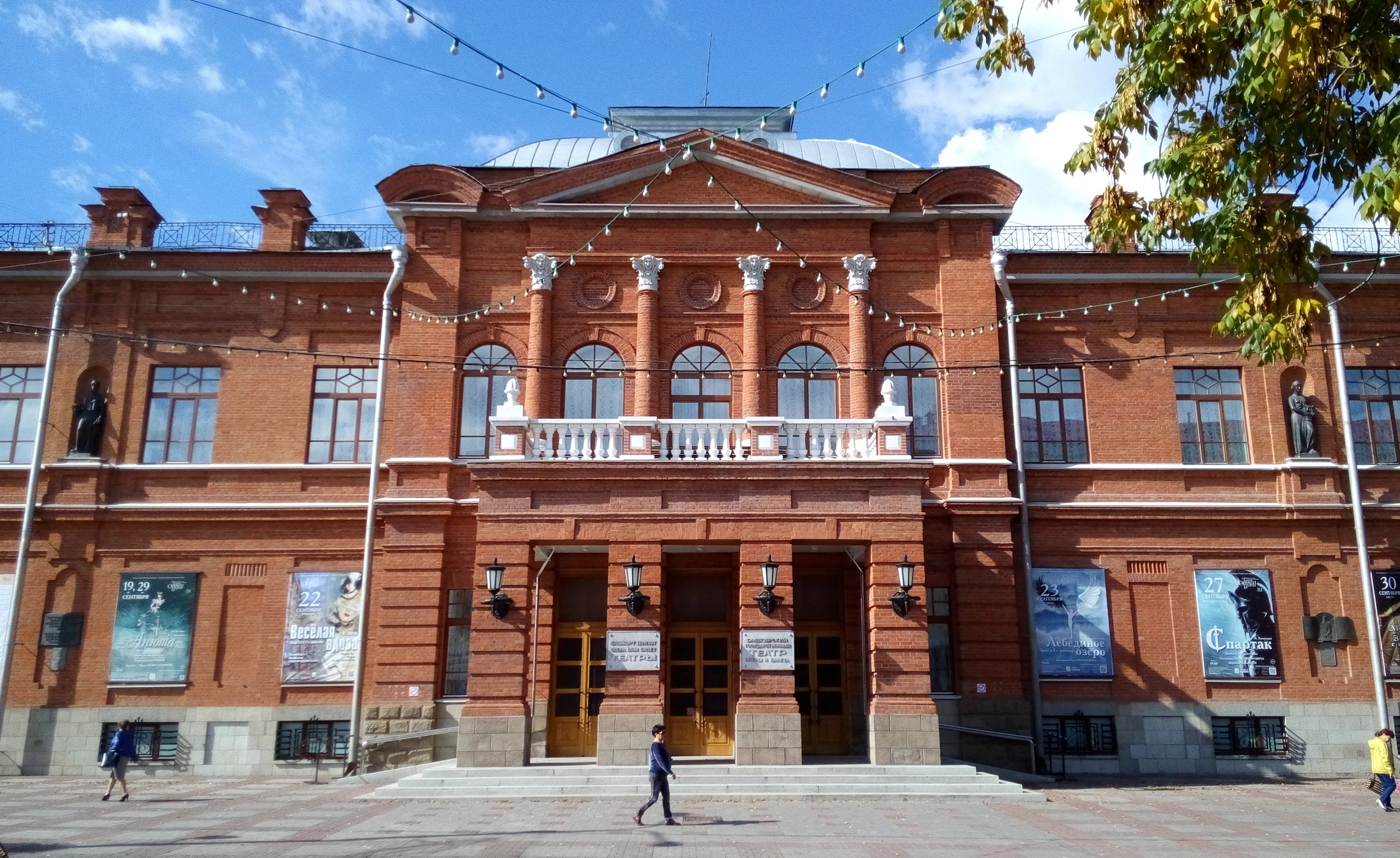 Народный дом С.Т. Аксакова: улица Ленина, 5а / улица Пушкина, Уфа, Башкортостан